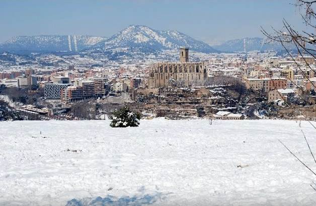 Imatge de Manresa després d'una nevada el febrer del 2013.